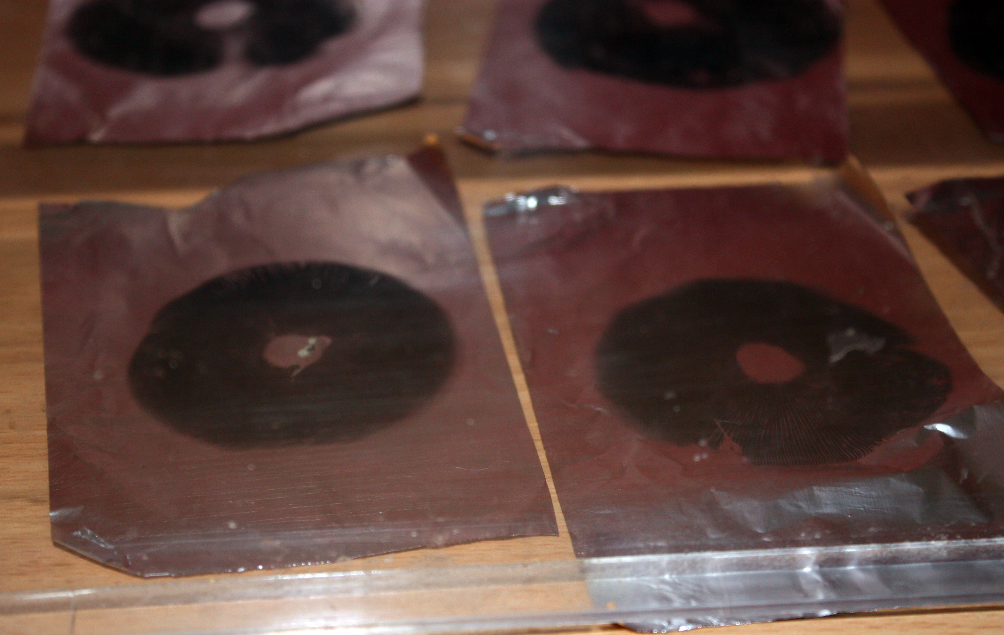 Valmiita itiölaskeumia.